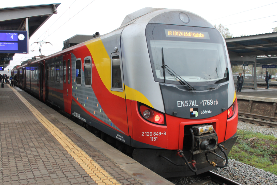 Elektryczny zespół trakcyjny EN57AL-1769 stoi na stacji Warszawa Zachodnia.